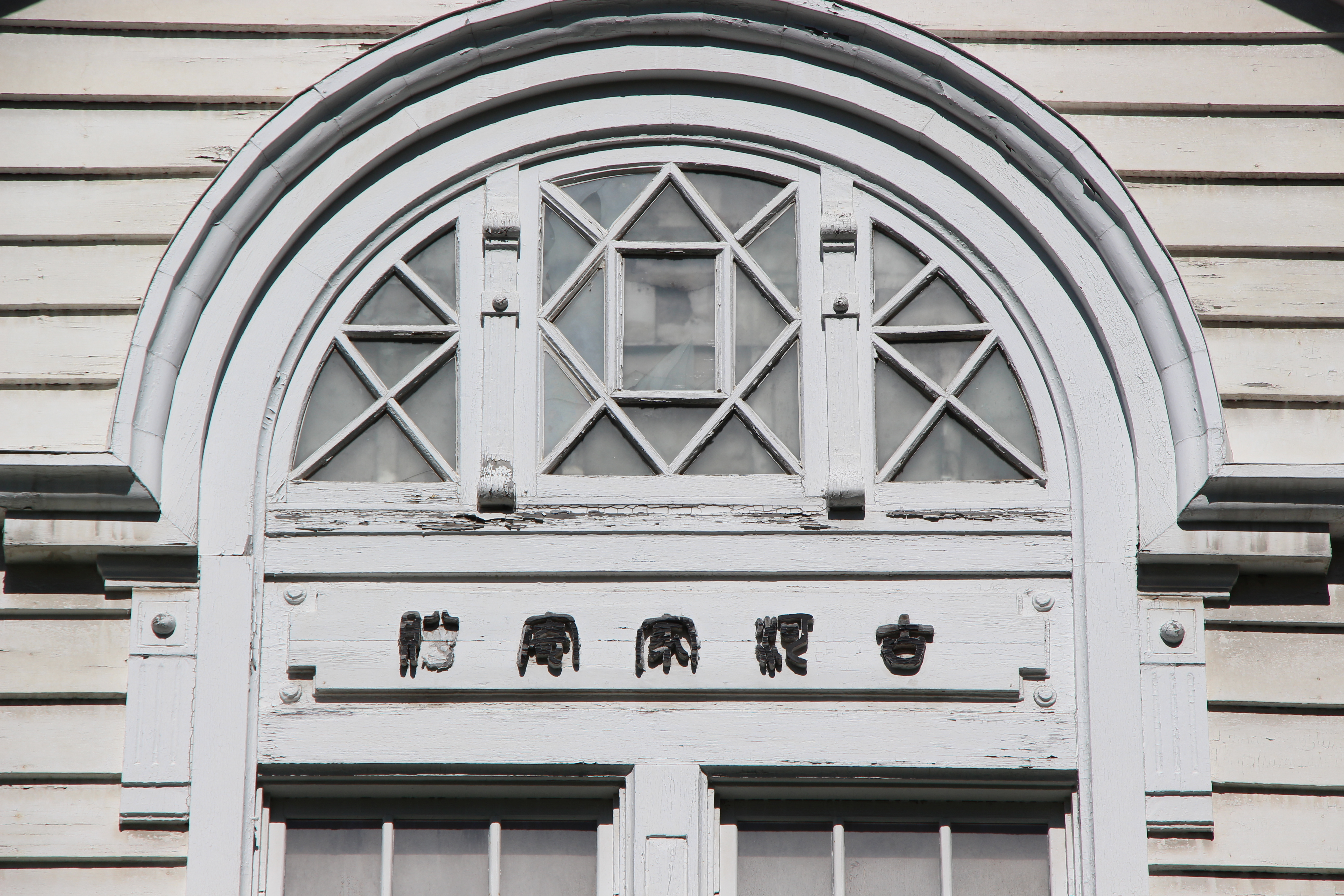 撮影日 2016/10/01